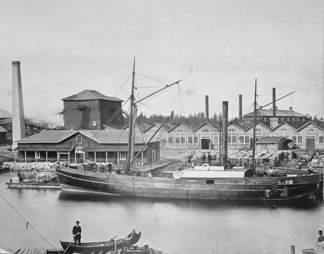 Oravin järvimalmiruukki 1880-luvun lopulla; Vasemmalla höyrykoneen savupiippu. Iso puurakennus on masuunien katos, laiva on höyrykuunari ”Dagmar.